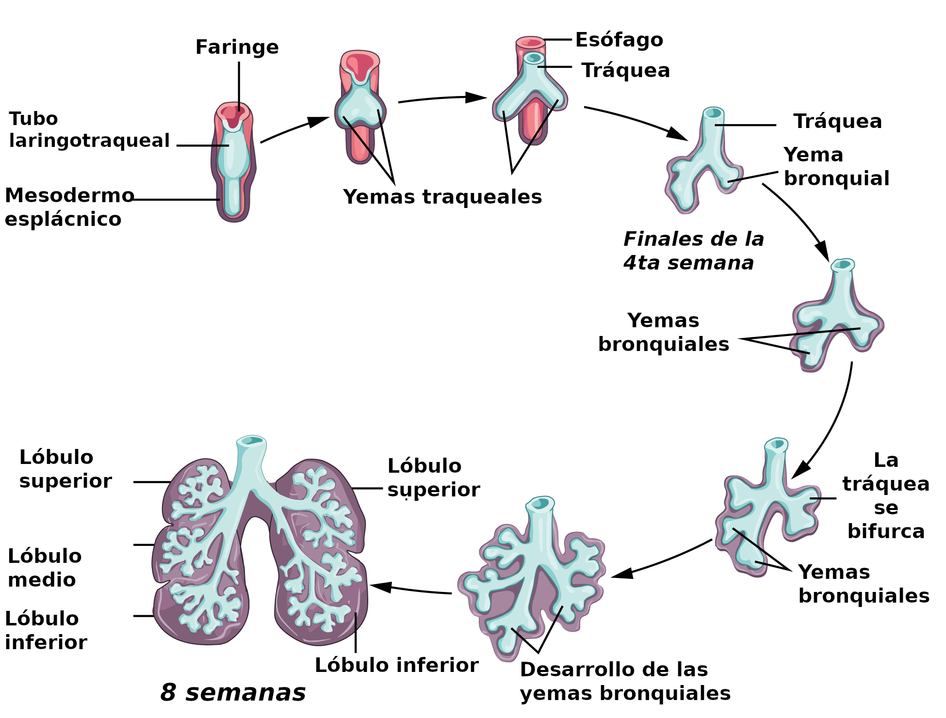 Esquema del desarrollo pulmonar, desde su inicio como mesoderma esplácnico hasta la completación del árbol pulmonar.